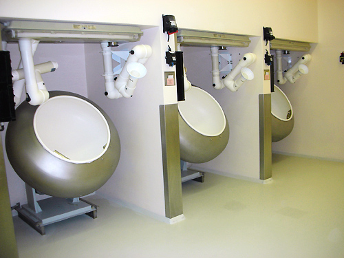 Produktionsanlage der pharmazeutischen Industrie